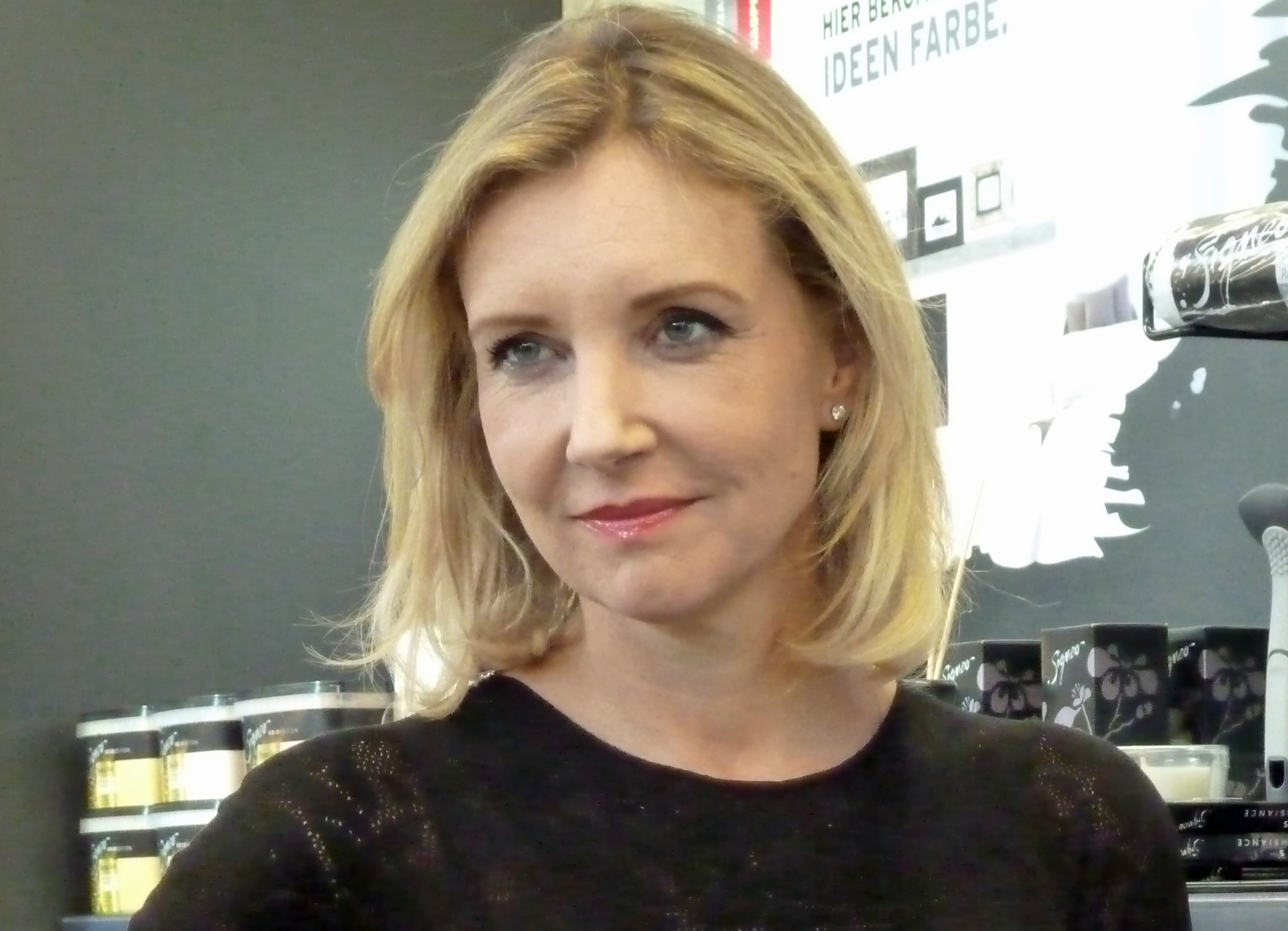 Jette Joop (2015)